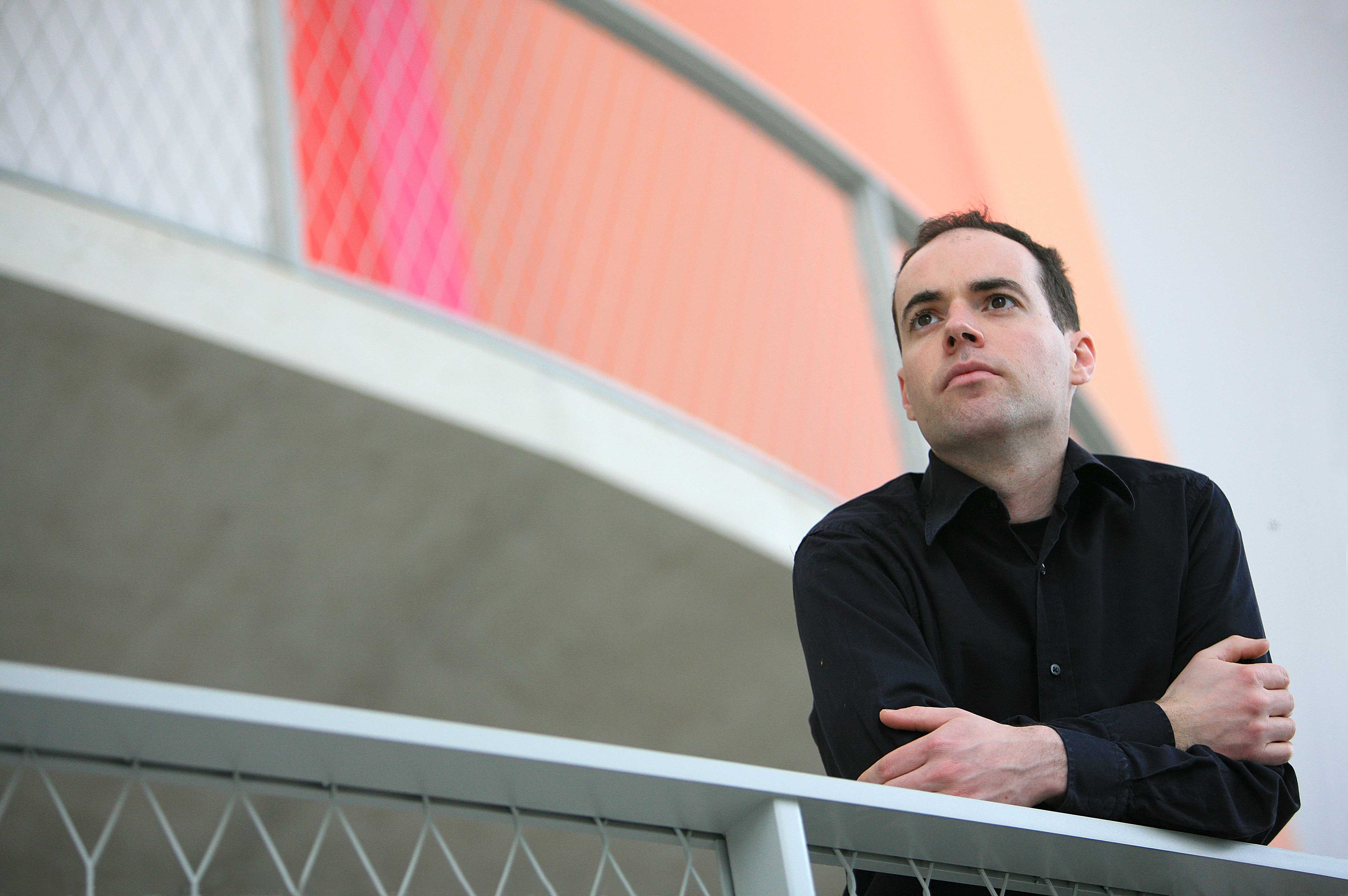 De Benoît Blegot